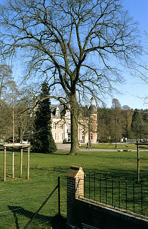 Procinciaal domein Huizingen: het kasteel